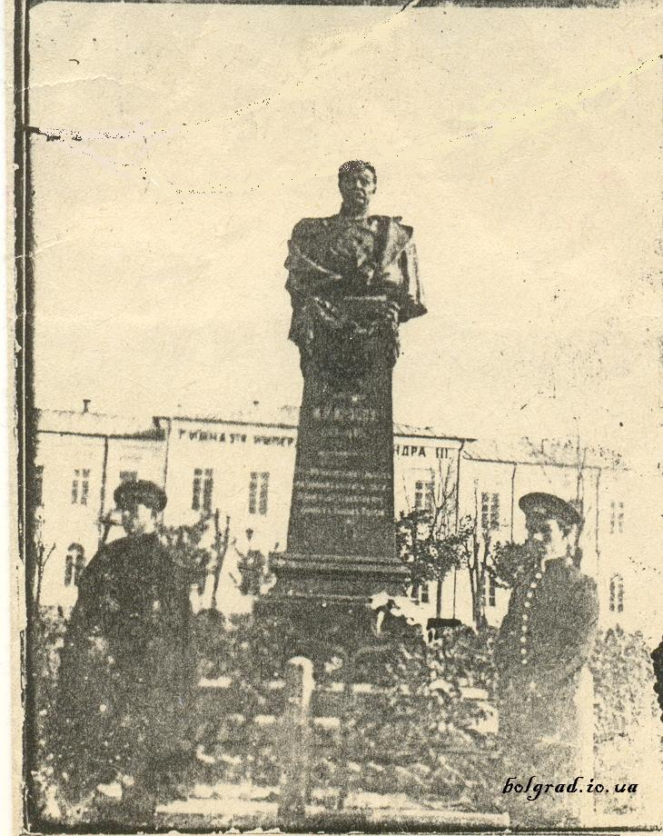 Памятник Ивану Никитичу Инзову (1768—1845) — русскому генералу в Болграде. Архивное фото